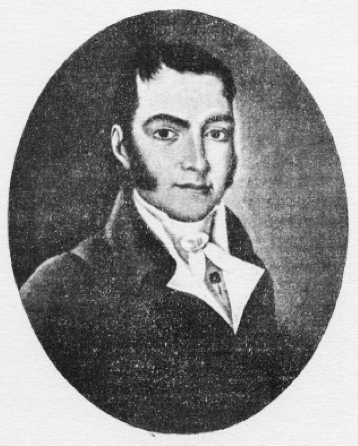 José Fernández y Neira en Album Galicia